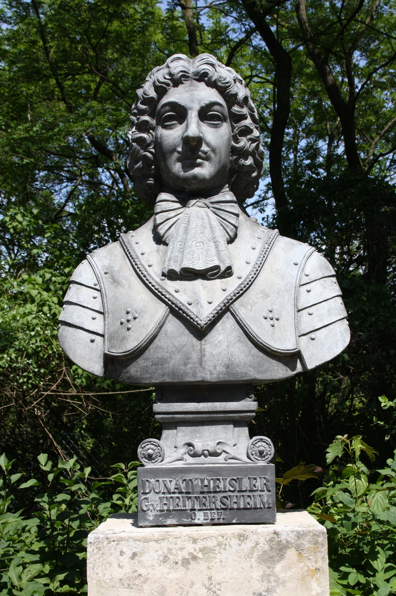 Büste in der Gedenkstätte Heldenberg (Niederösterreich)